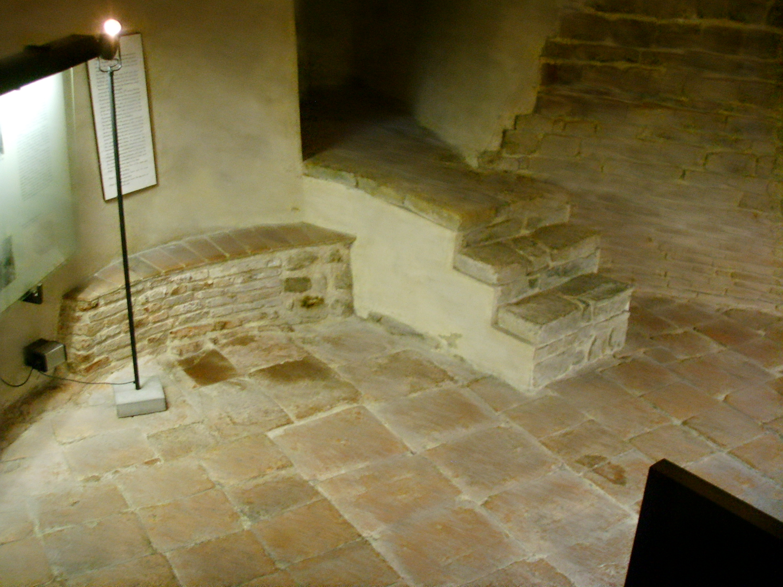 Museo della pagliazza, base della torre